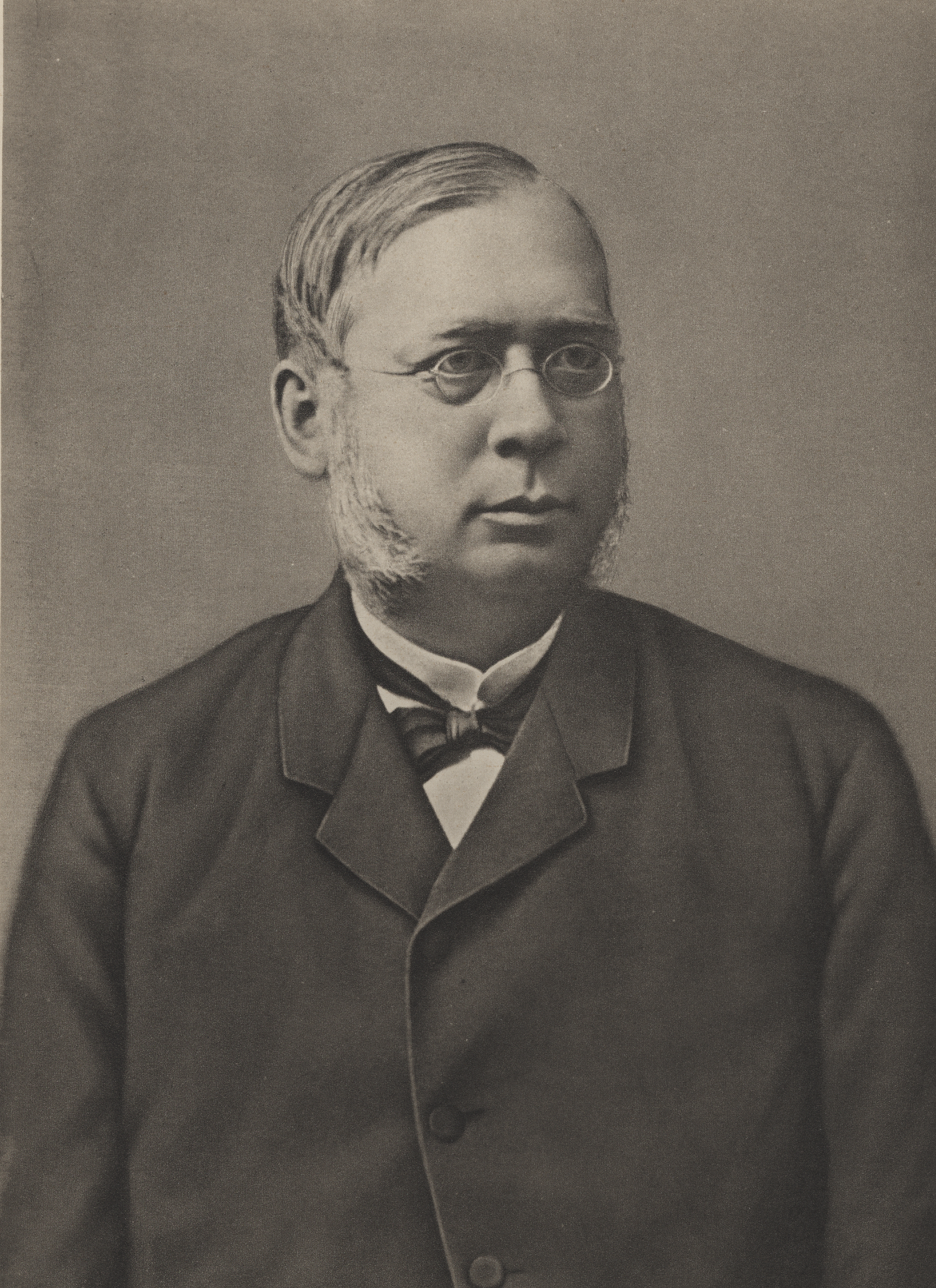 Format: Litografi etter fotografi Utgivelsesår / Published: 1914 (Vore Høvdinger 58). Utgiver / Publisher: F. Bruns Bokhandels Forlag, Trondhjem. Eier / Owner Institution: Trondheim byarkiv, The Municipal Archives of Trondheim Arkivreferanse / Archive reference: Ila skole, Va - F9428